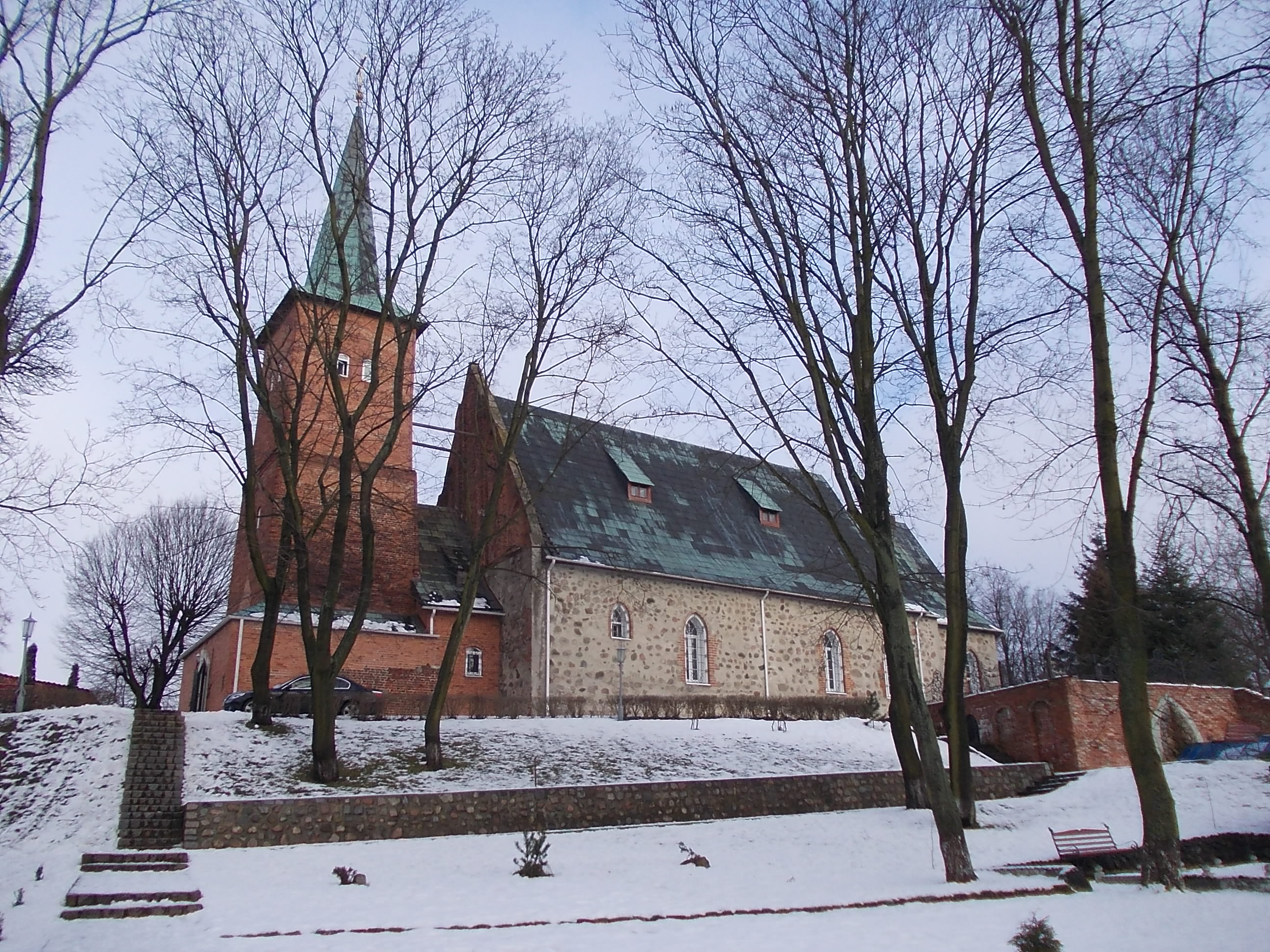 Свято-Никольский собор в Калининграде (бывшая Юдиттен-кирха Кёнигсберга)